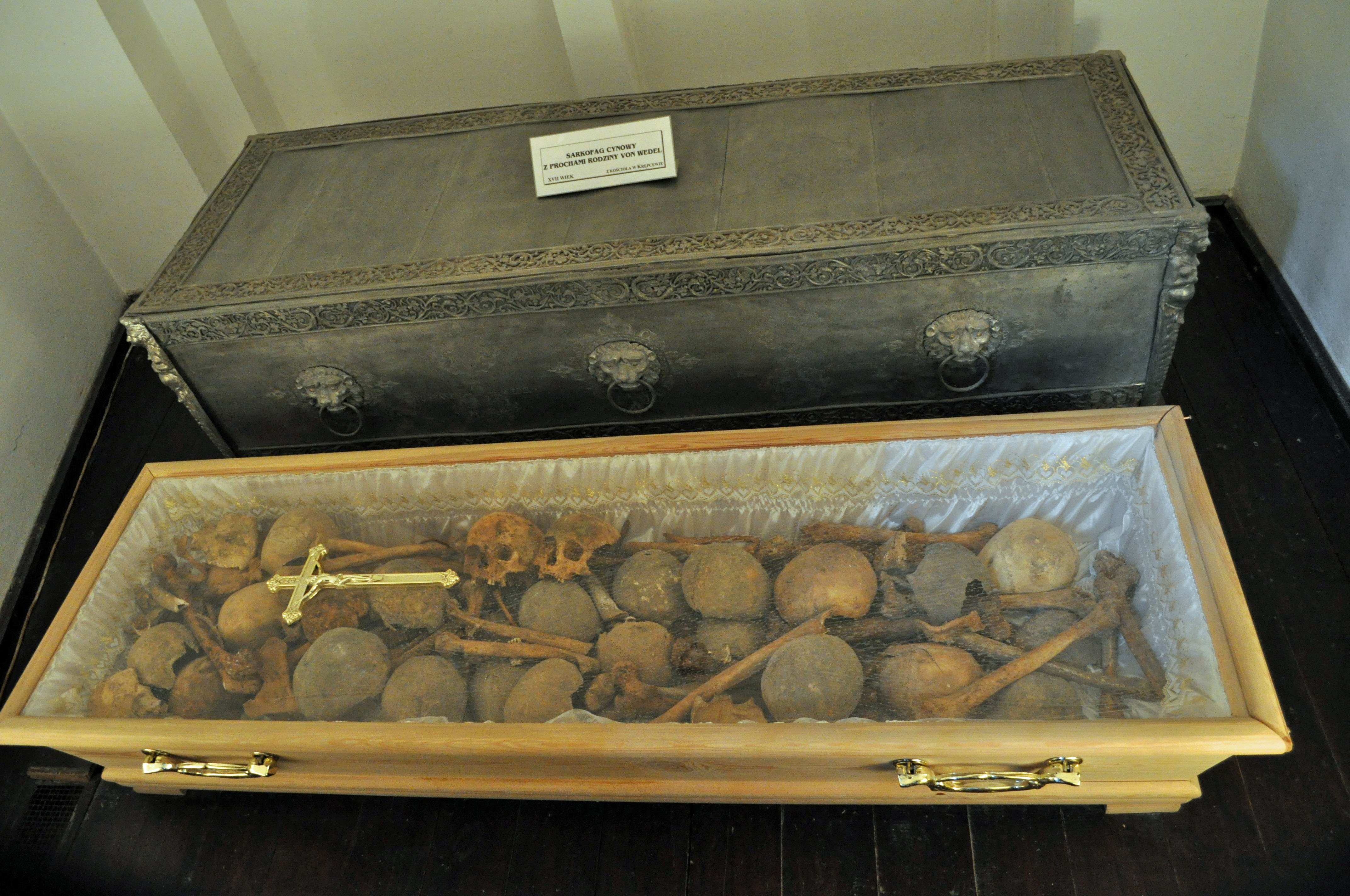 Szczecin, Jakobikirche, t (2011-07-28) by Klugschnacker in Wikipedia